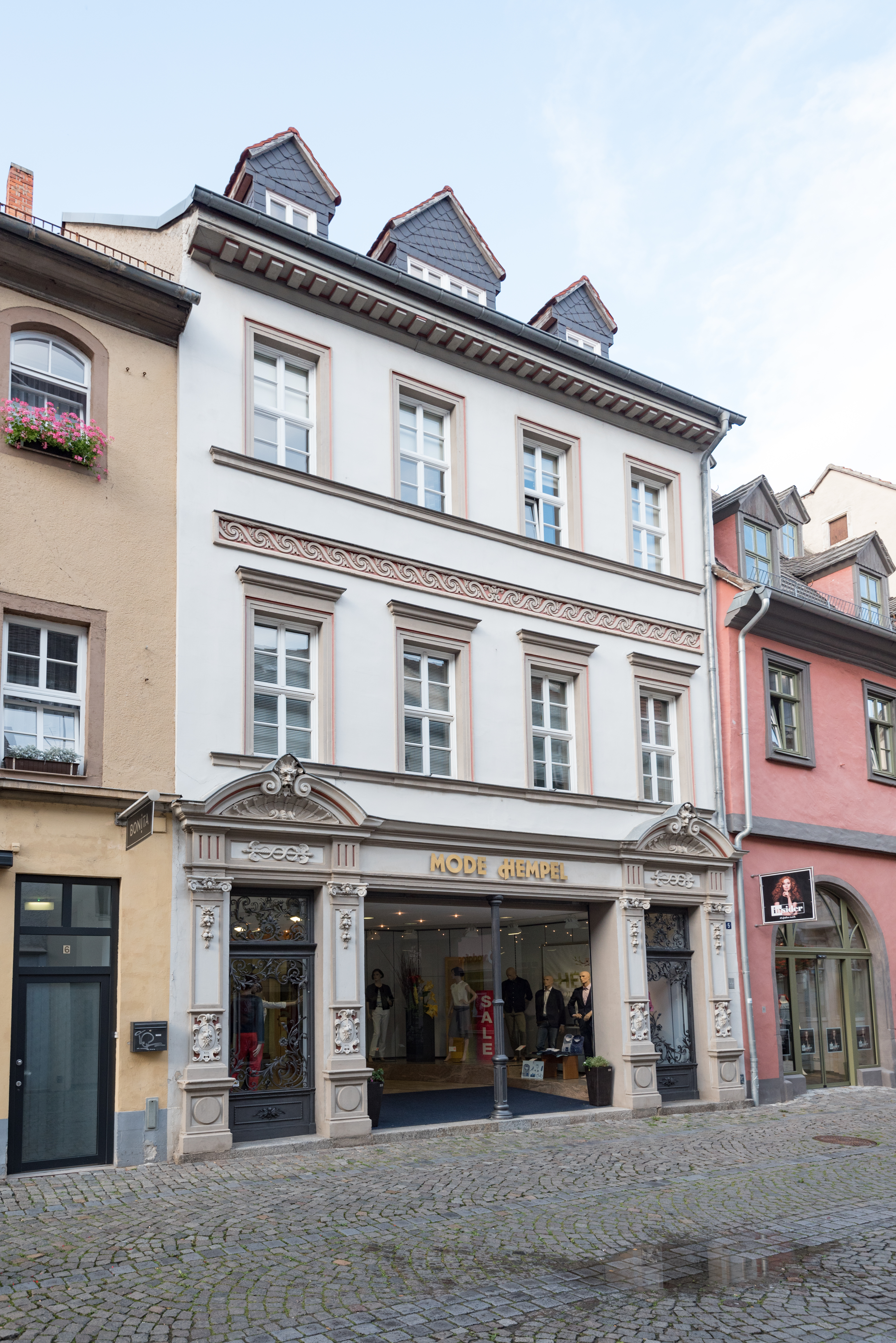 Naumburg (Saale), Herrenstraße 5